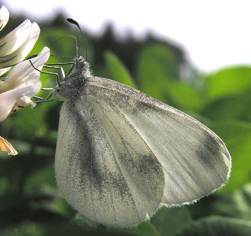 Tintenfleck-Weißling bzw. Senfweißling (leptidea sinapis), aufgenommen am Waldrand in der Nähe von Oppenrod